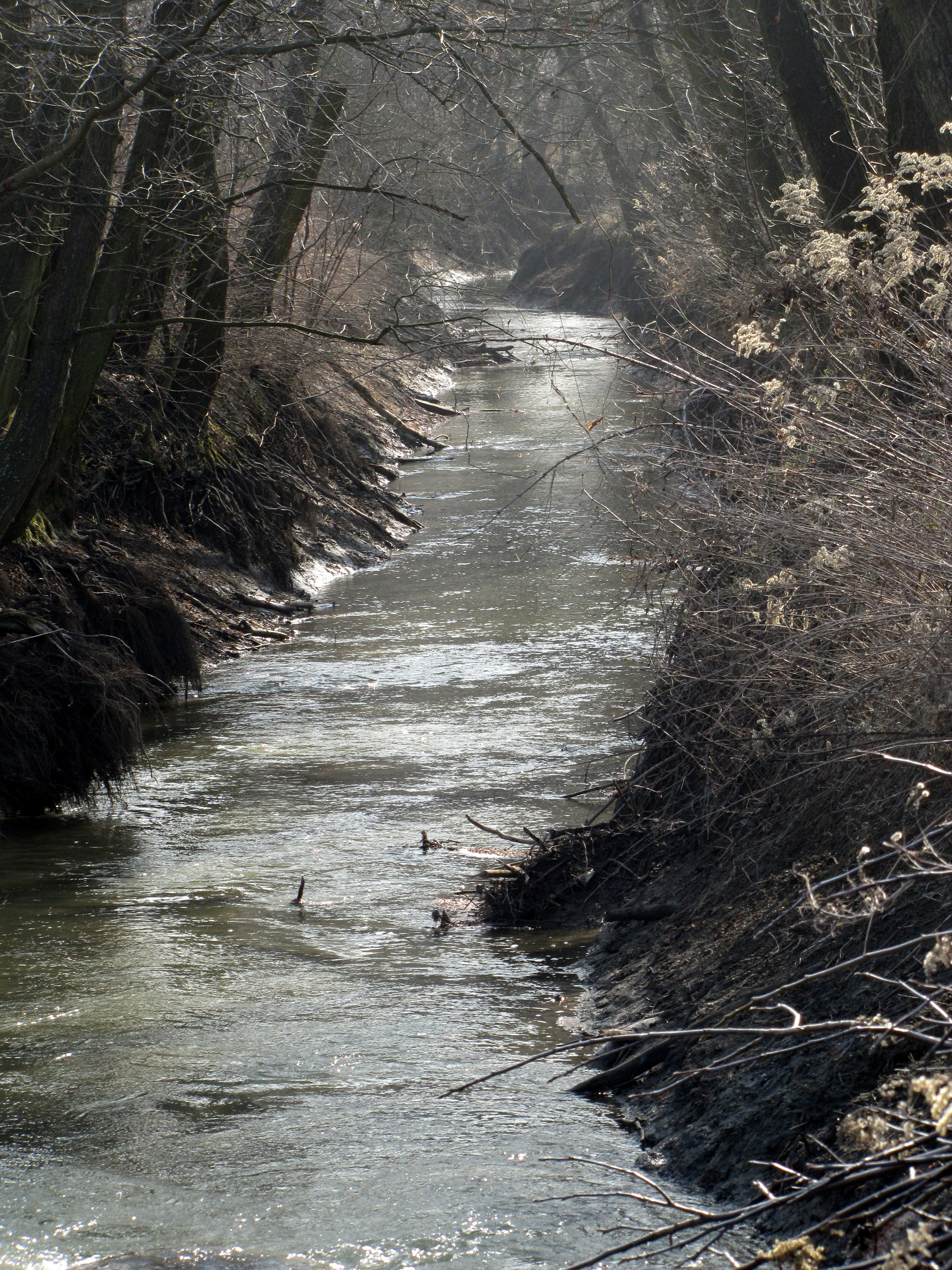 Kyjovka tekoucí podél boršovských lůk v Kyjově